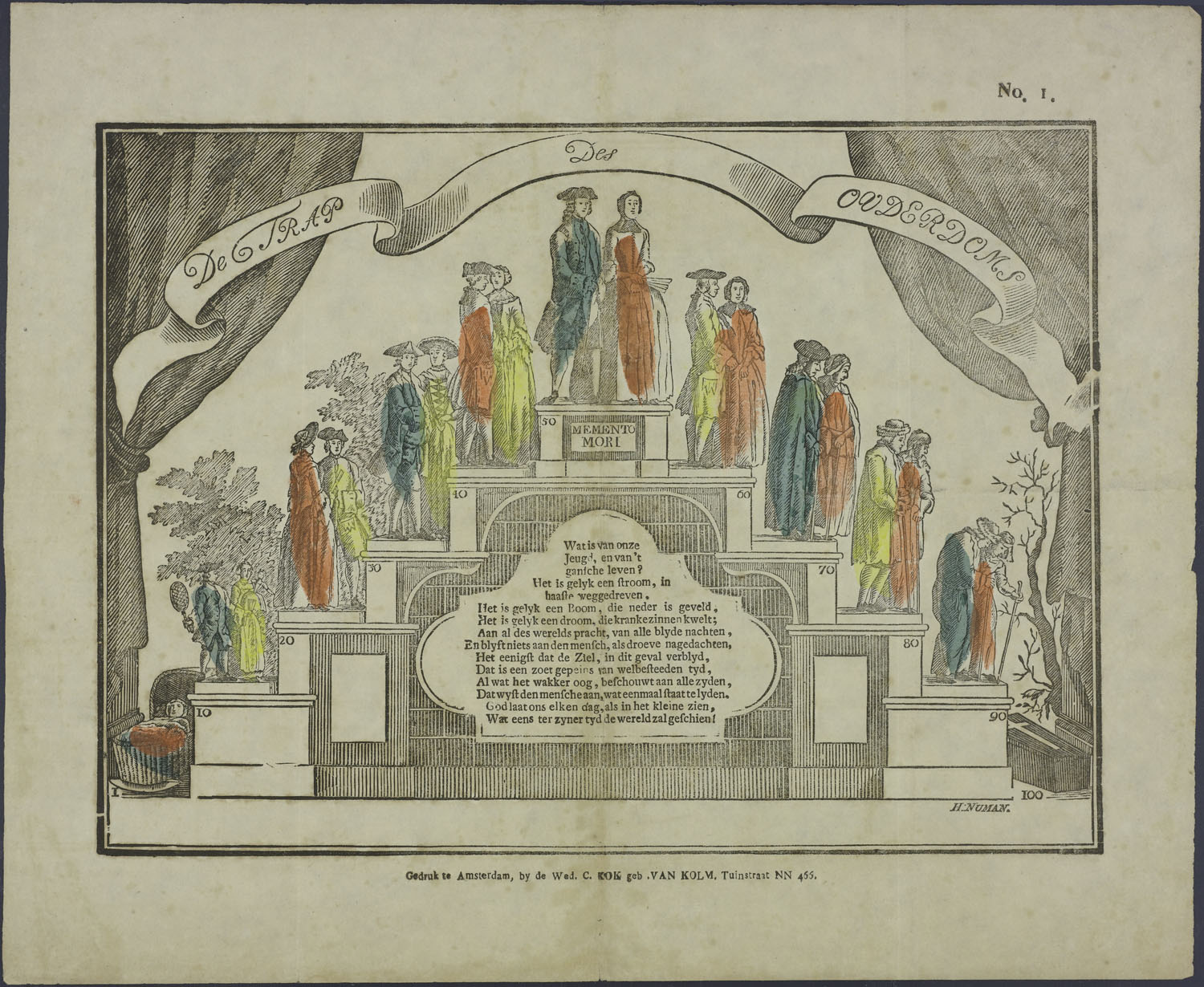 Oblong centsprent met 1 houtsnede, met de afbeelding van een levenstrap. Een kind in een wieg, vervolgens in oplopende leeftijden diverse paren, waarvan sommige dames met een waaier in de hand. Aan het eind van de trap een doodskist. Tekst op de onderzijde van de trap: 'Memento mori'. Daaronder een rijmende tekst van 15 regels over vergankelijkheid.